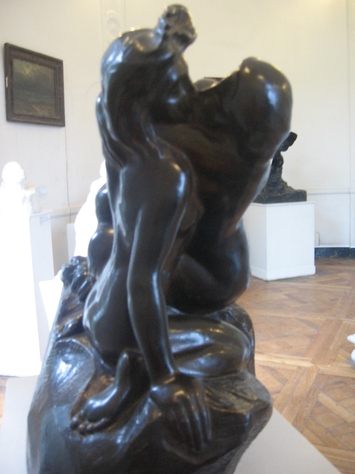 Rodin et Musee d'Orsay 193